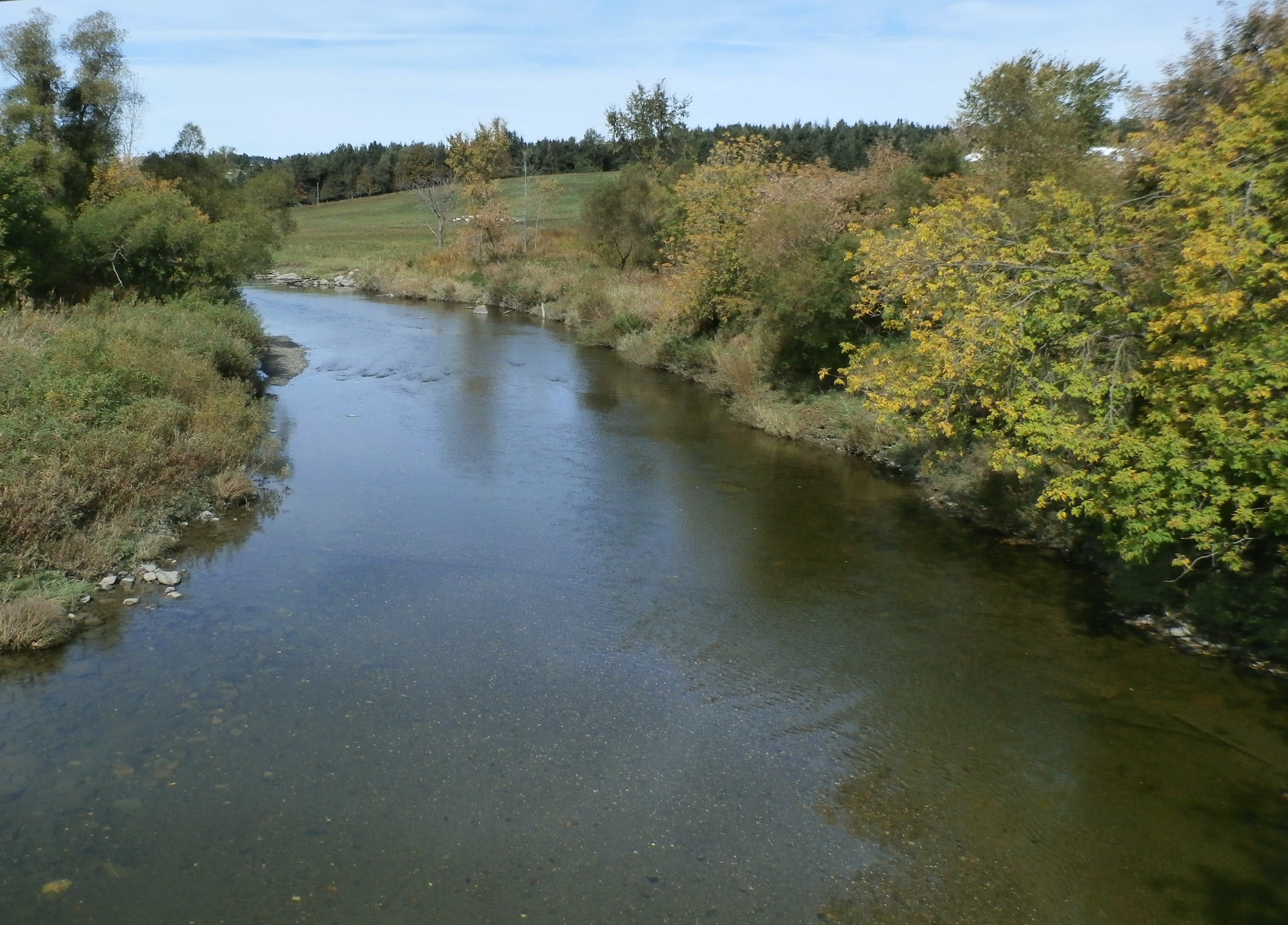 Riviere Eaton à Sawyerville.